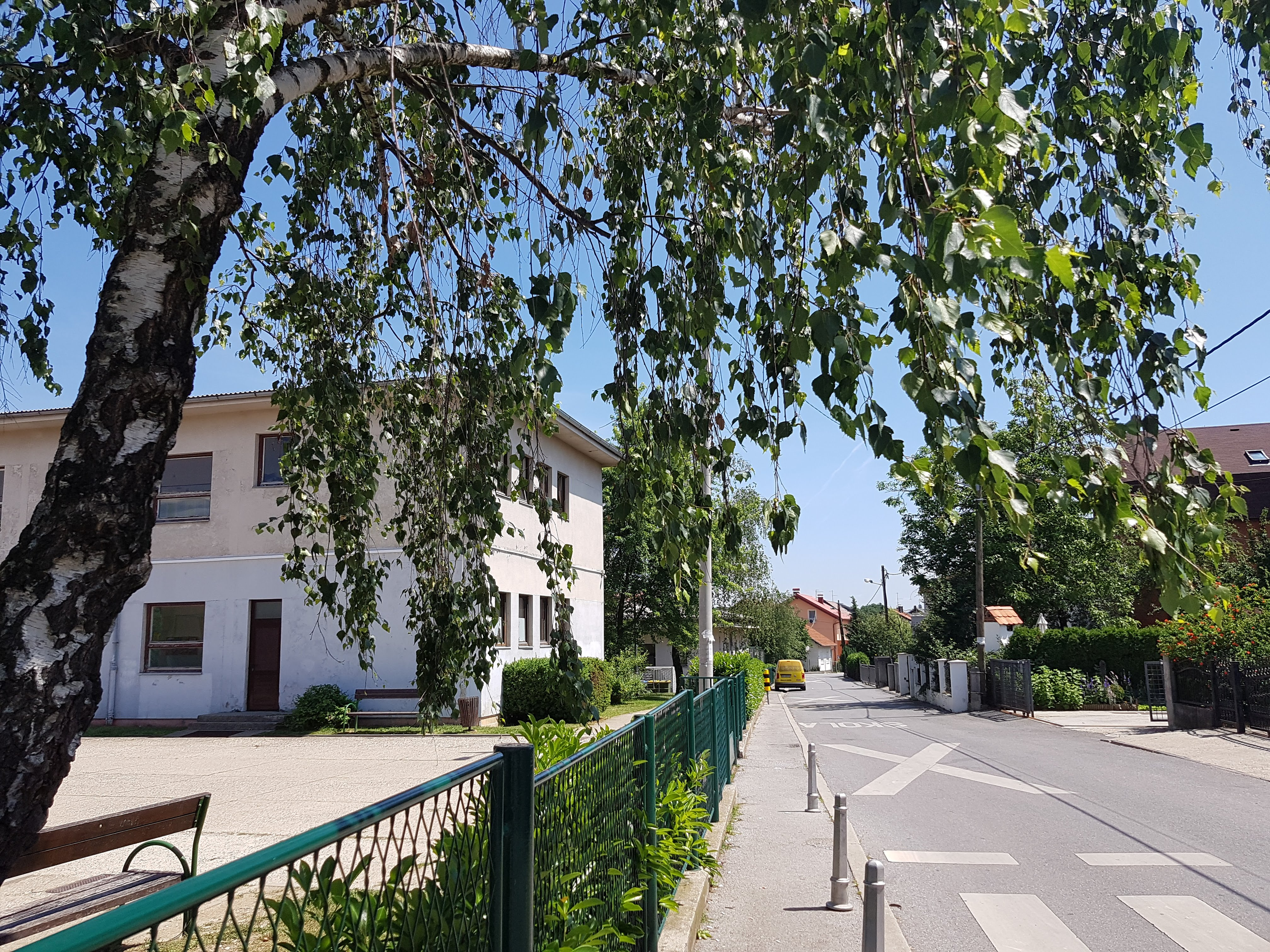 Ulica Trnac, s lijeve strane OŠ Bukovac.